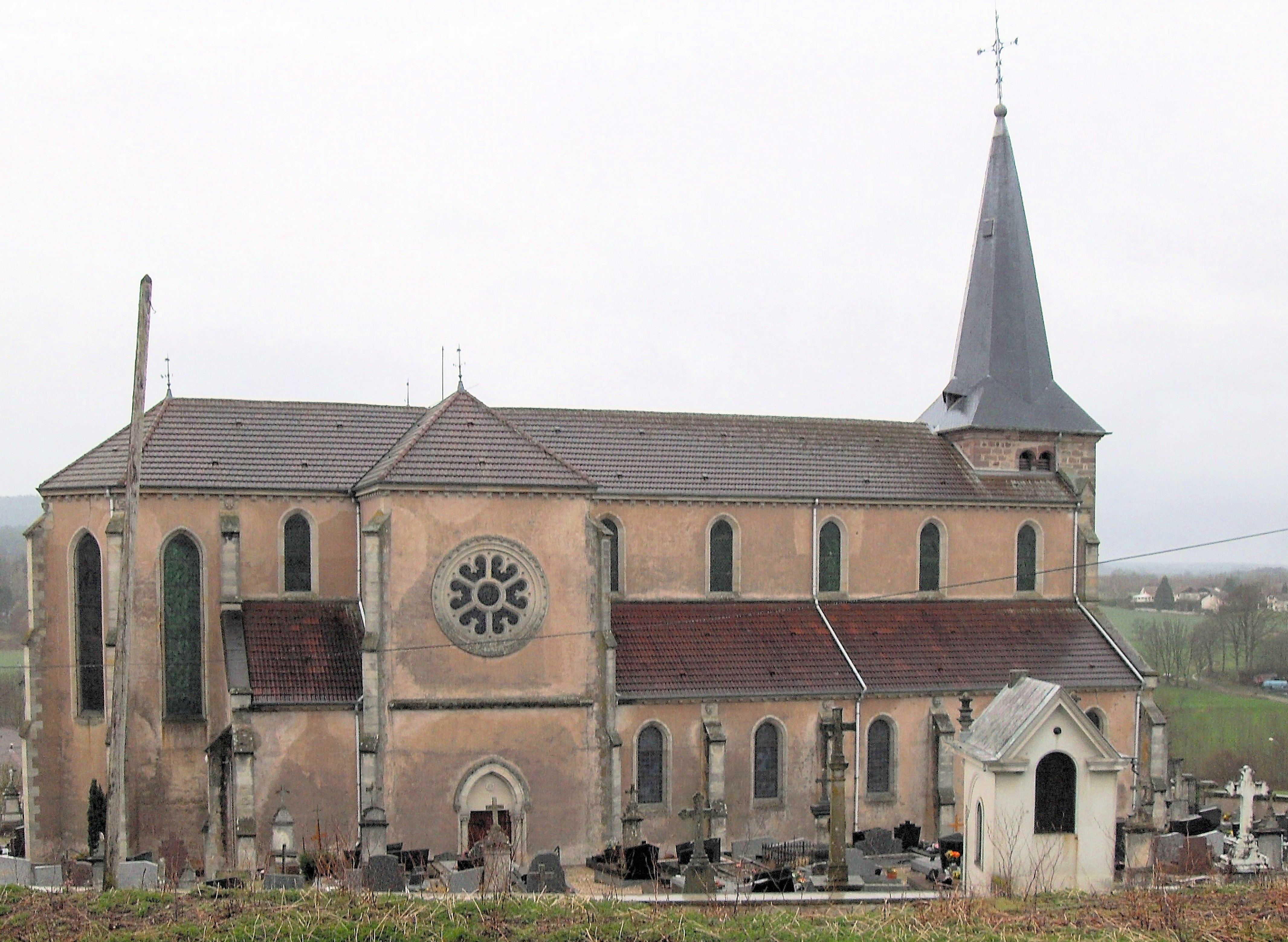 Côté nord de l'église à Grandvillers